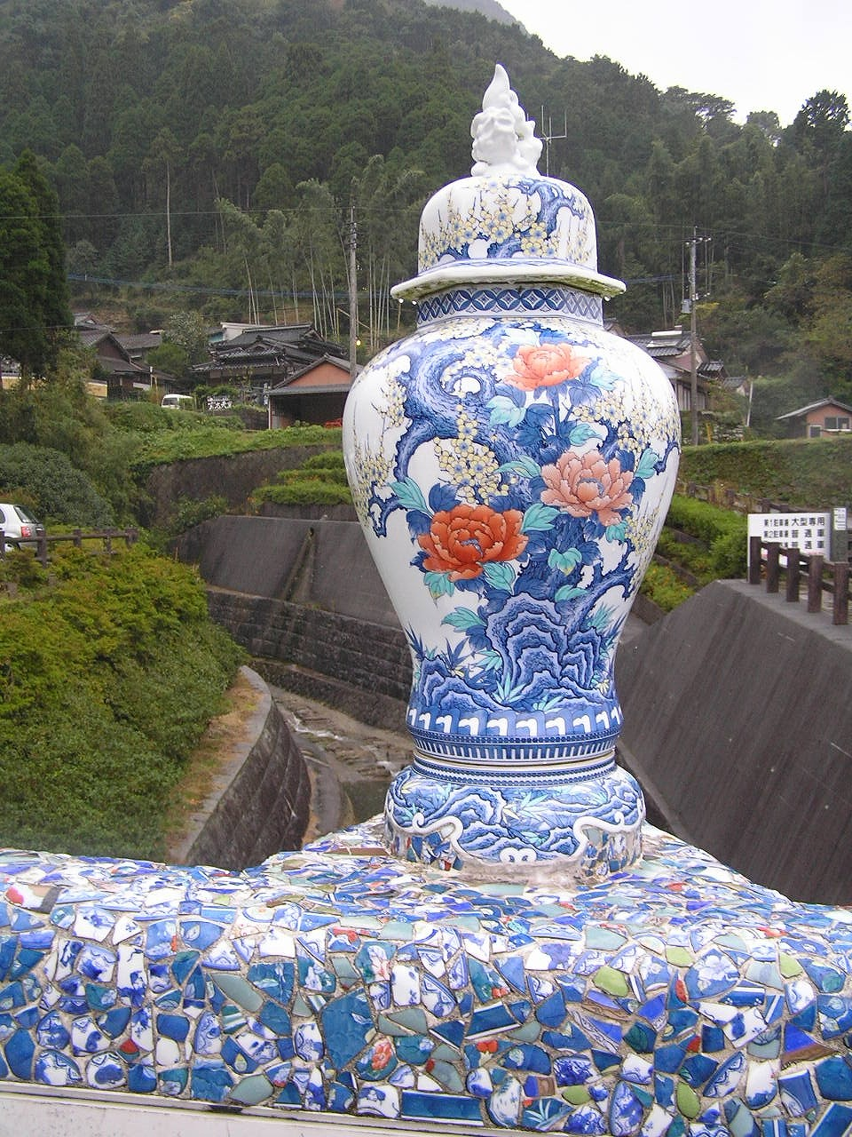 大川内山（おおかわちやま、佐賀県伊万里市)鍋島焼 橋